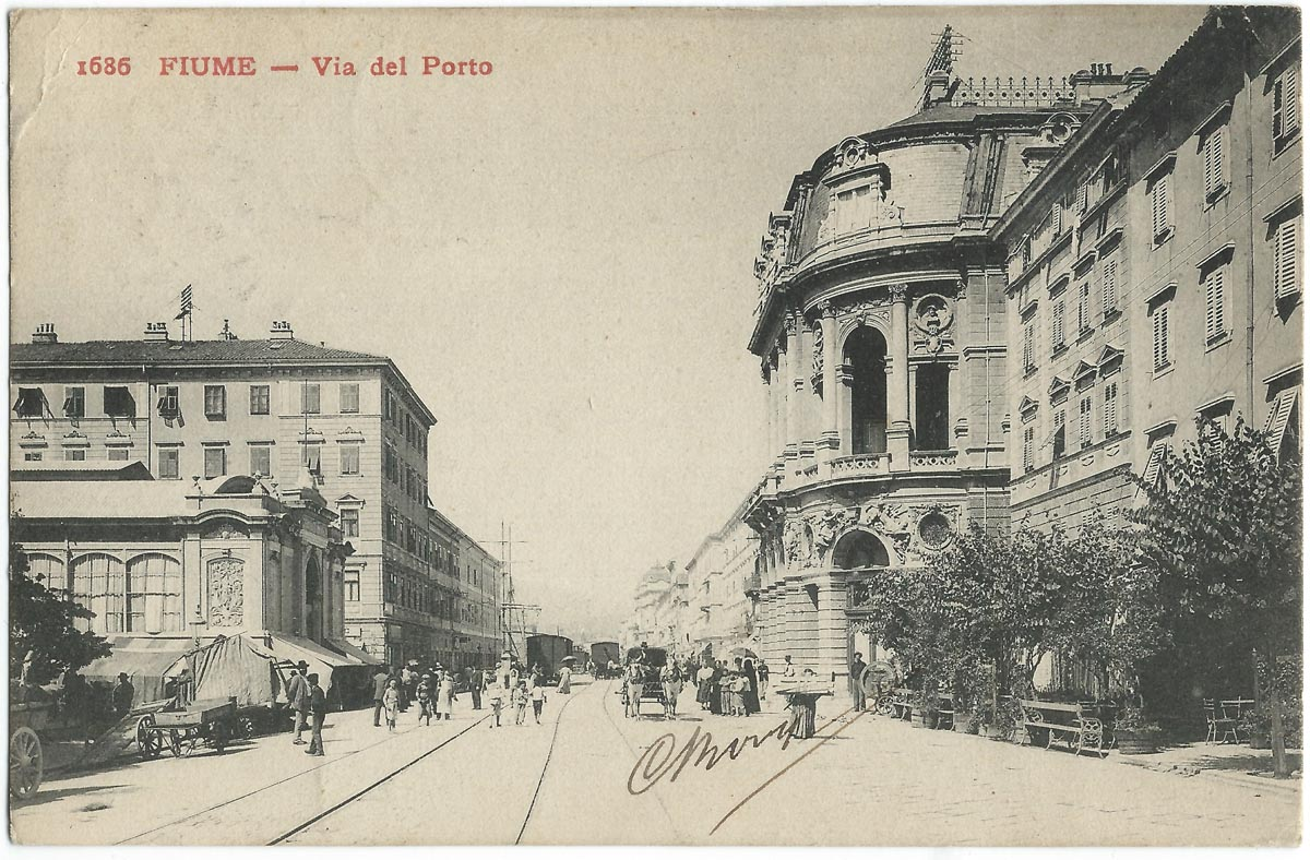 Vue de Fiume (aujourd'hui Rijeka en Croatie) dans l'empire austro-hongrois au début du XXe siècle.